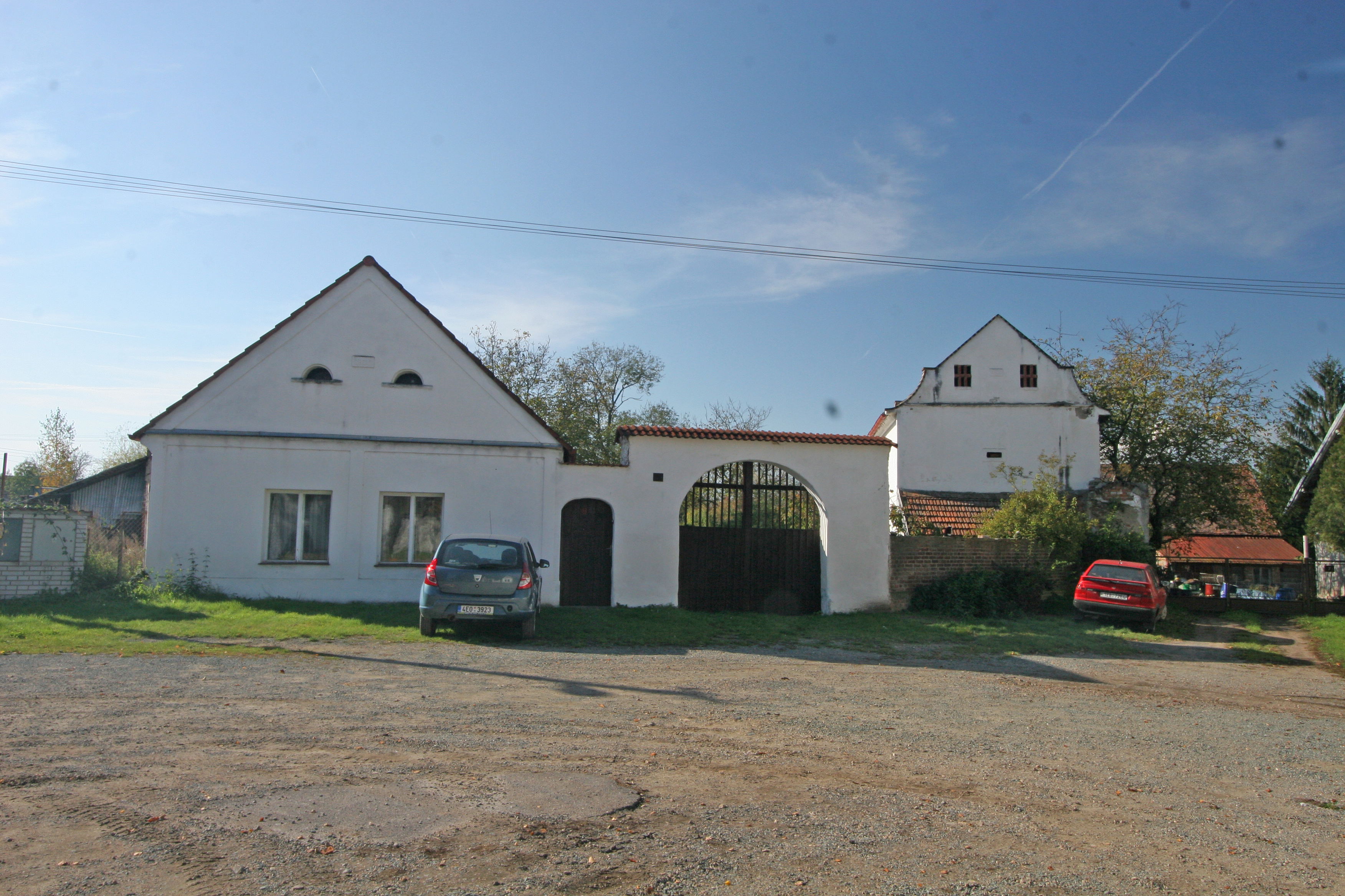 Venkovská usedlost (Lhota), Lhota 8